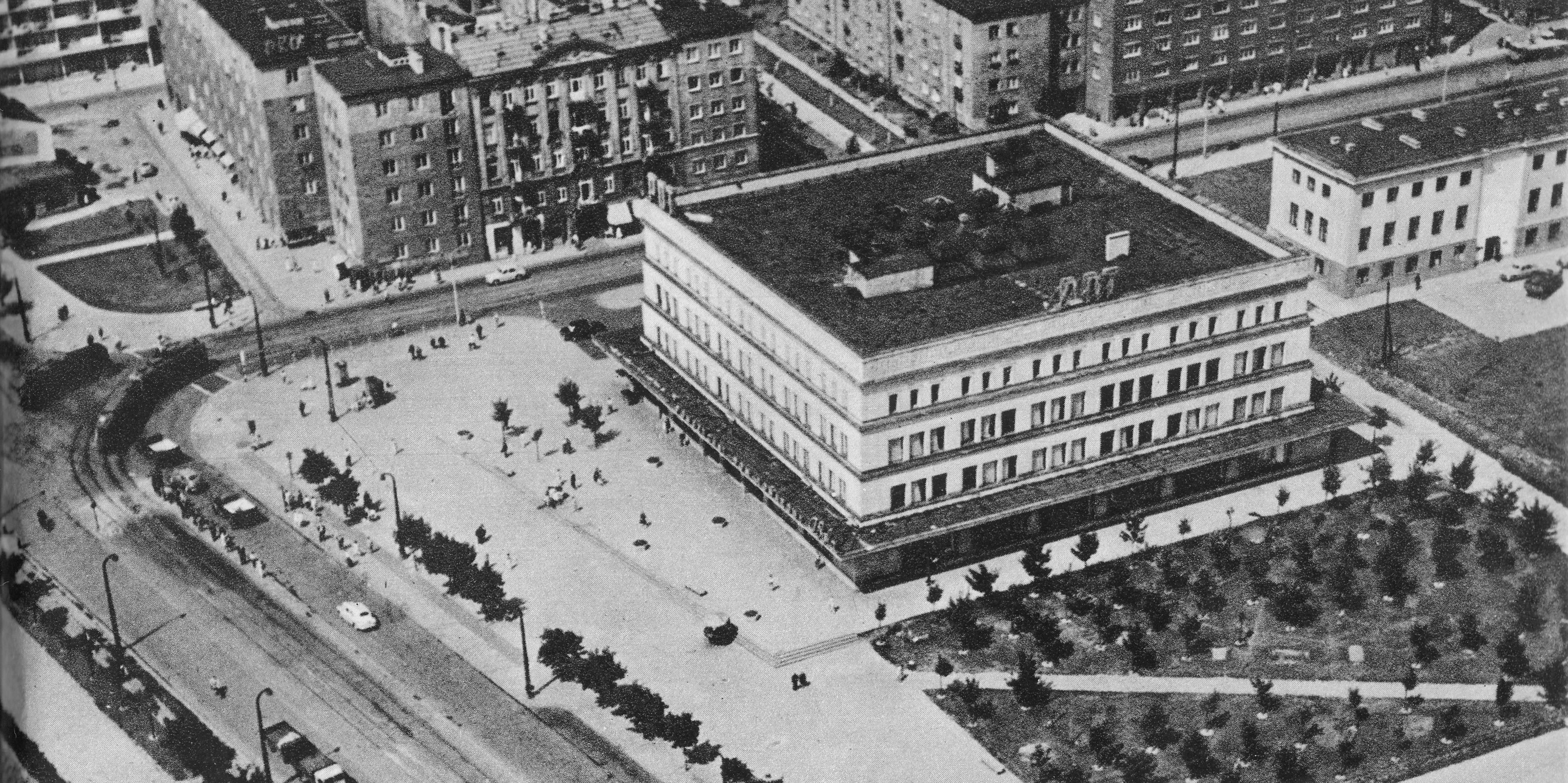 Powszechny Dom Towarowy na Woli z lotu ptaka